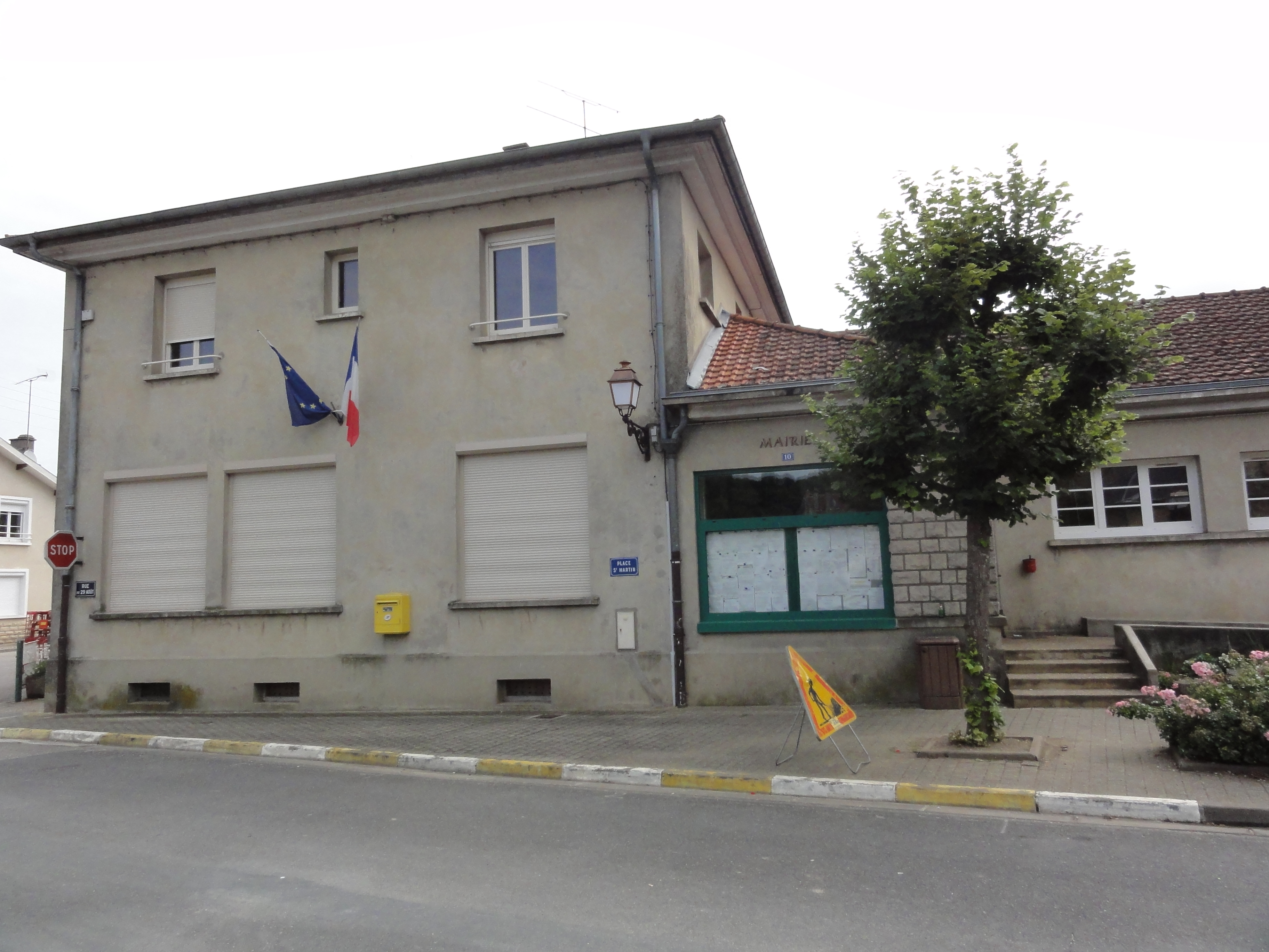 Beurey-sur-Saulx (Meuse) mairie